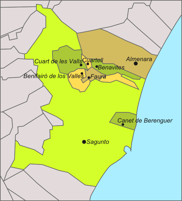 (Sub)comarca natural de la Vall de Segó según la división de Emili Beüt de 1934.